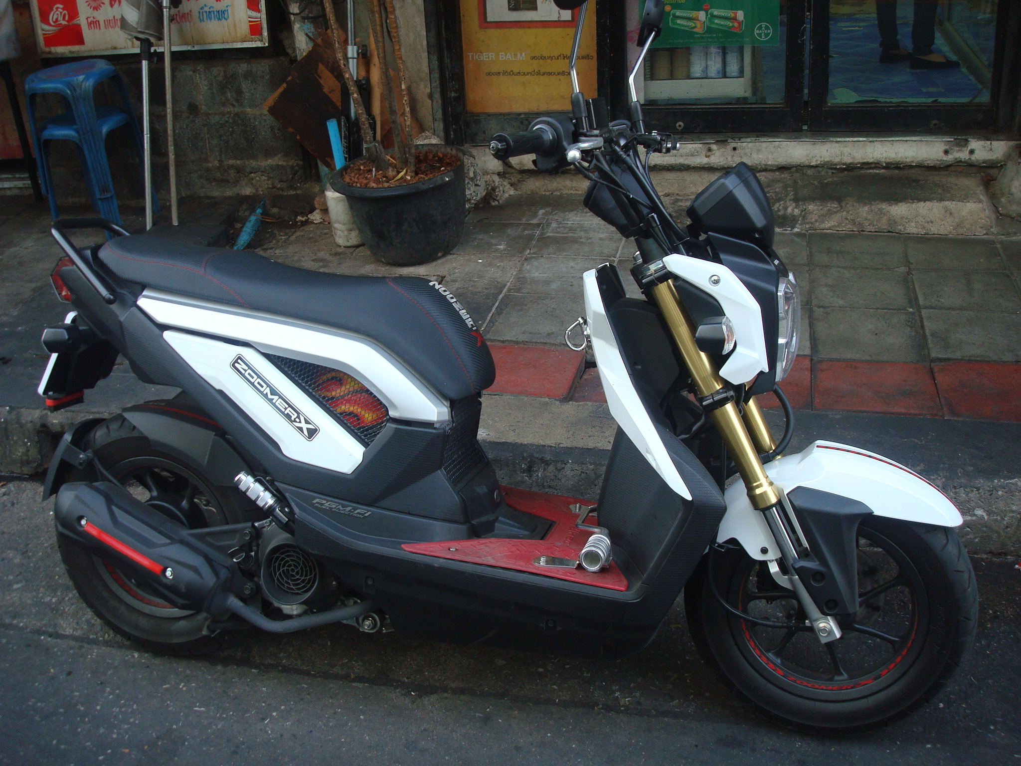 2012年からタイで製造されているもので、日本国内向けのZOOMERとは別。